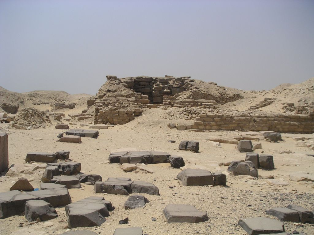 Vue sur la pyramide de reine au sud du temple funéraire d'Ouserkaf - Saqqarah - Ve dynastie égyptienne